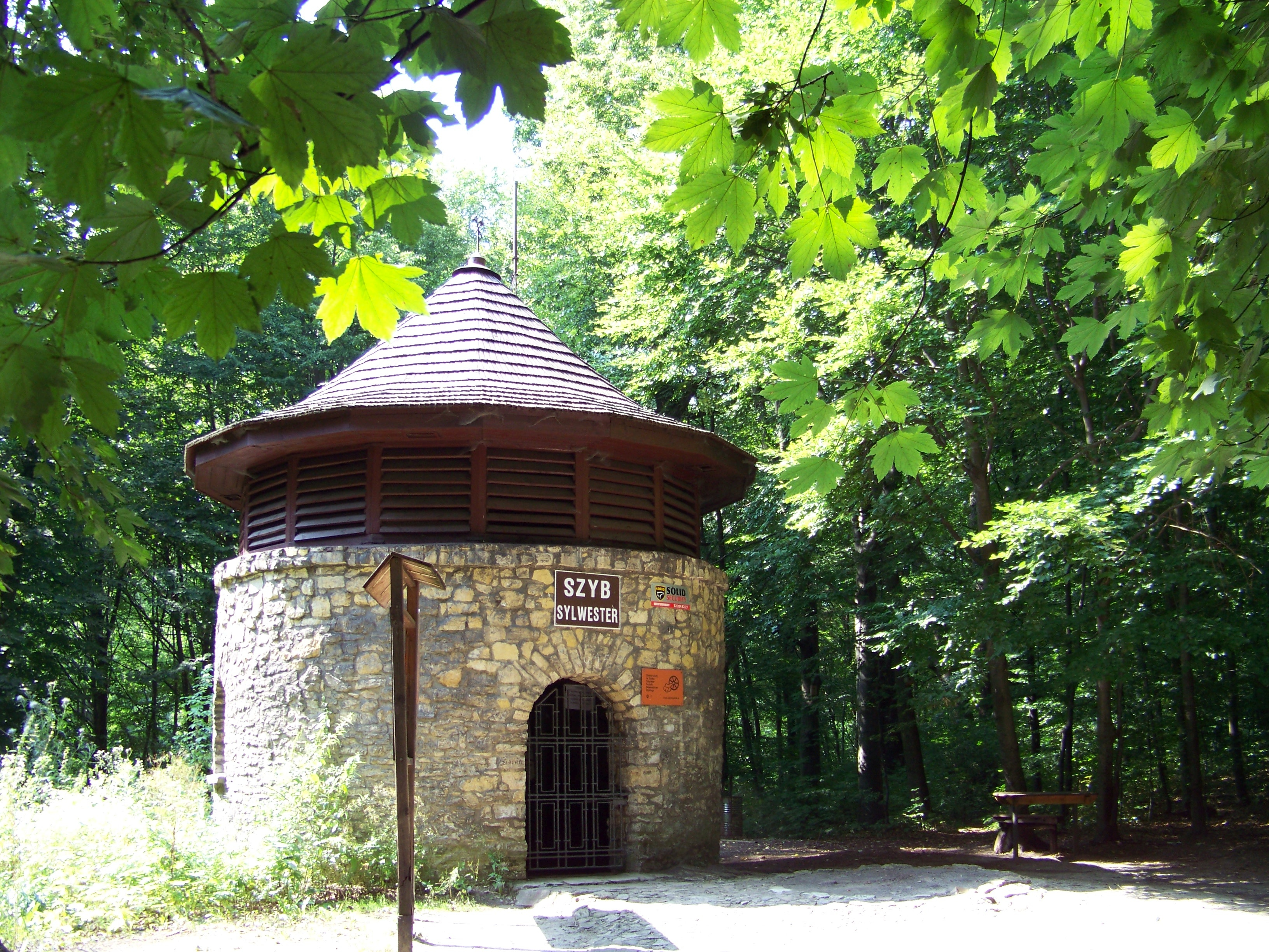 Szyb Sylwester